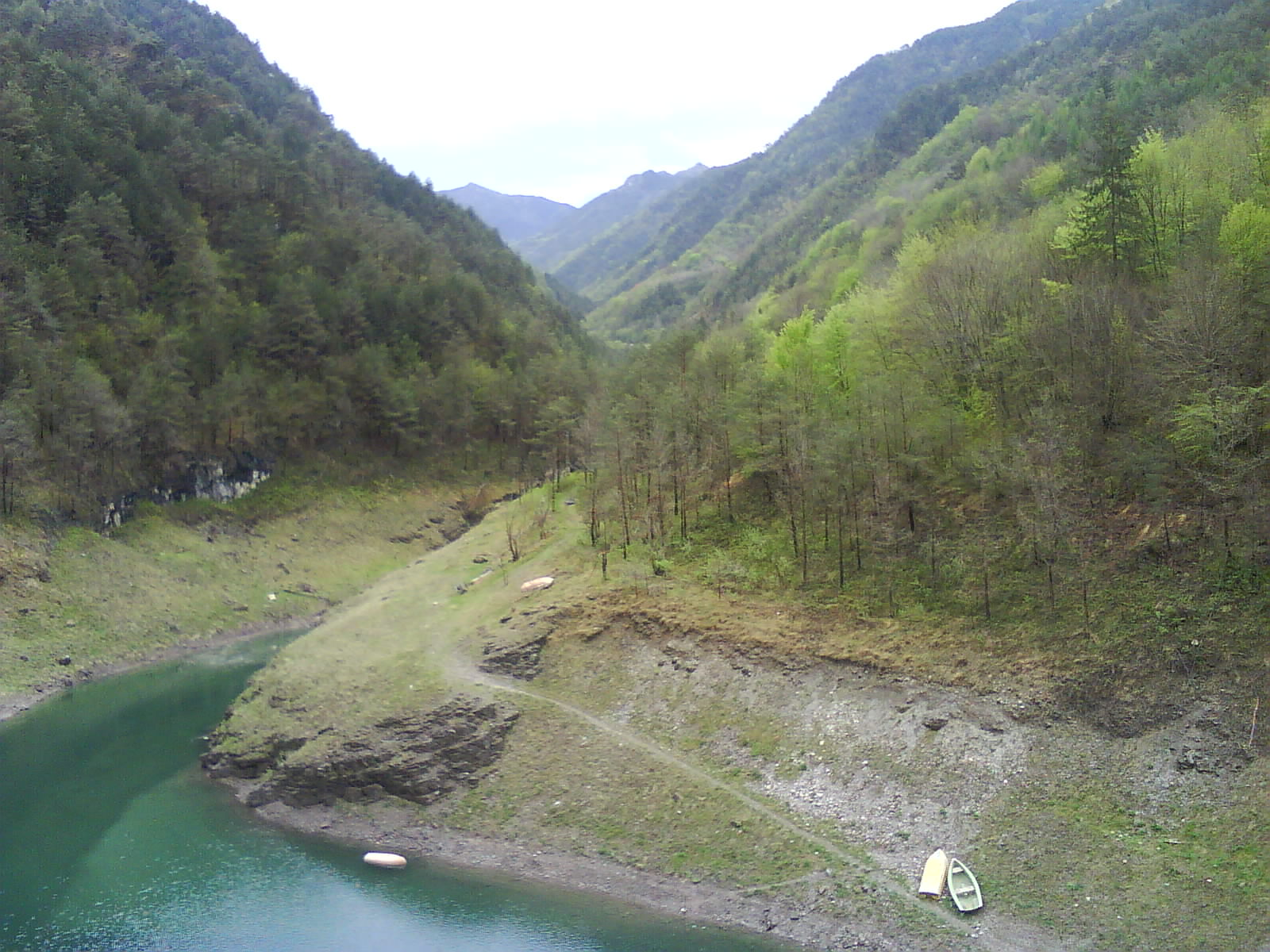 Vallata del Droanello in Valvestino